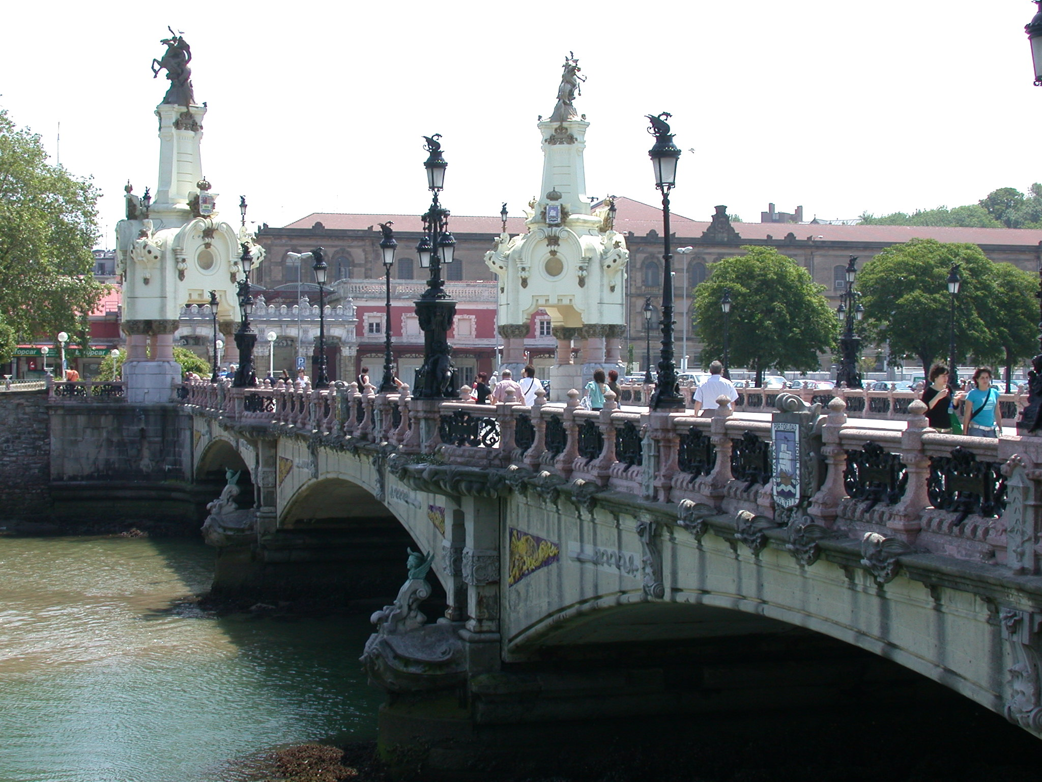 Puente de María Cristina, en San Sebastián (Euskadi, España)